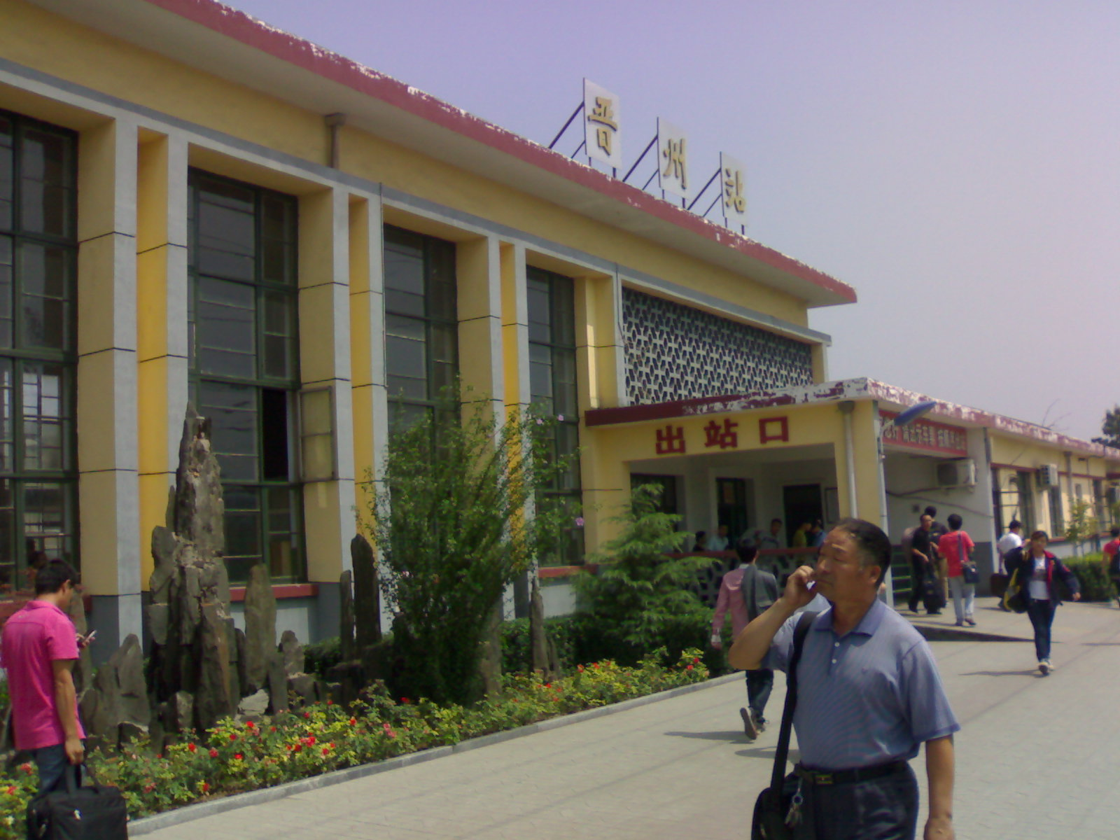 晋州站站房，南侧